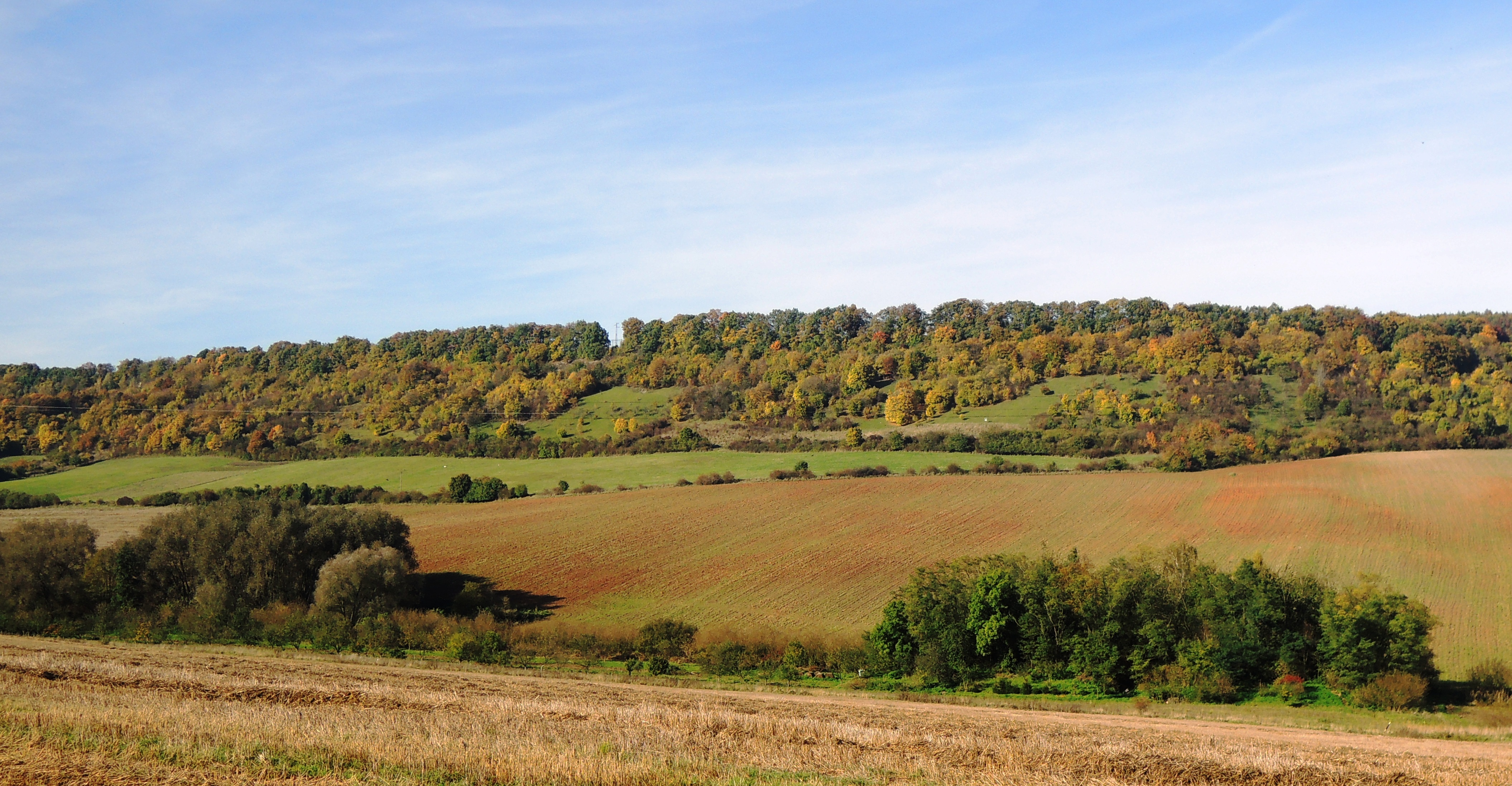 PR Milská stráň na podzim